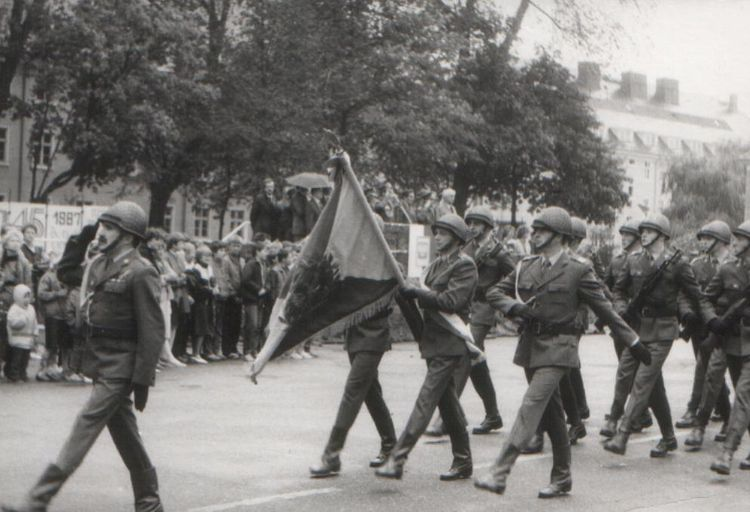 Stargard, 1987r. Przysięga wojskowa